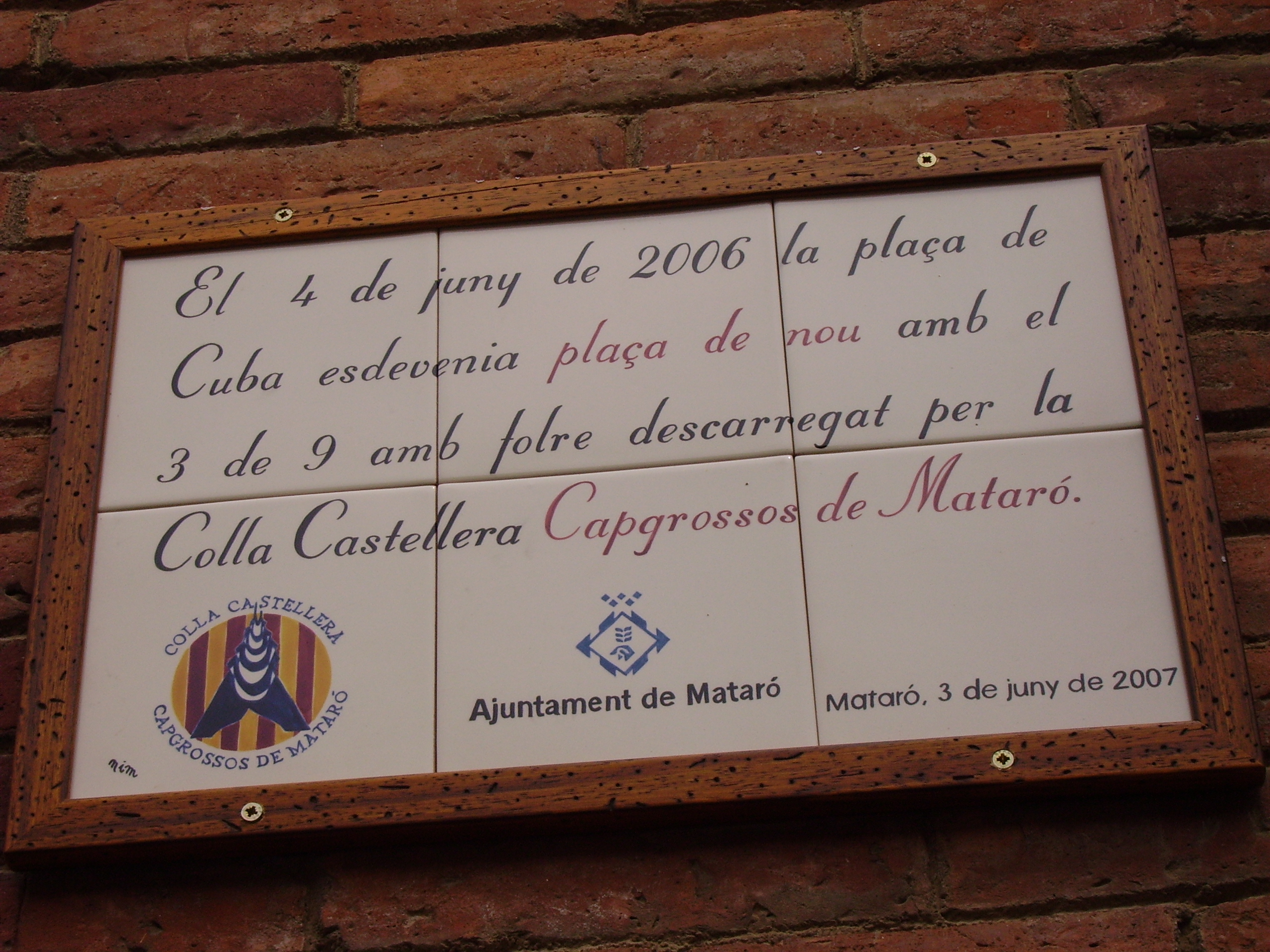 Placa a la Plaça de Cuba, Mataró, el Maresme, Catalunya.